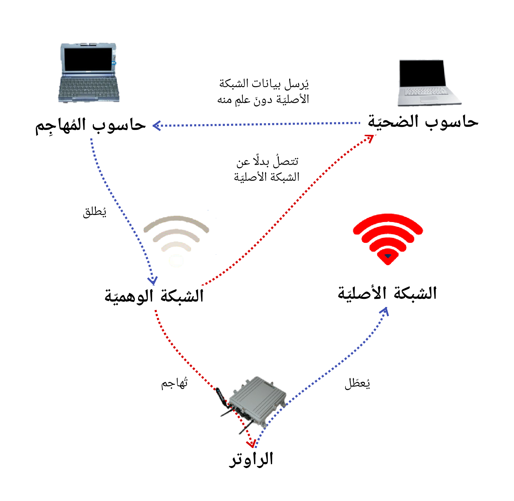 شرح مُبسّط لعملية هجوم التوأم الشرير على الشبكات اللاسلكيّة